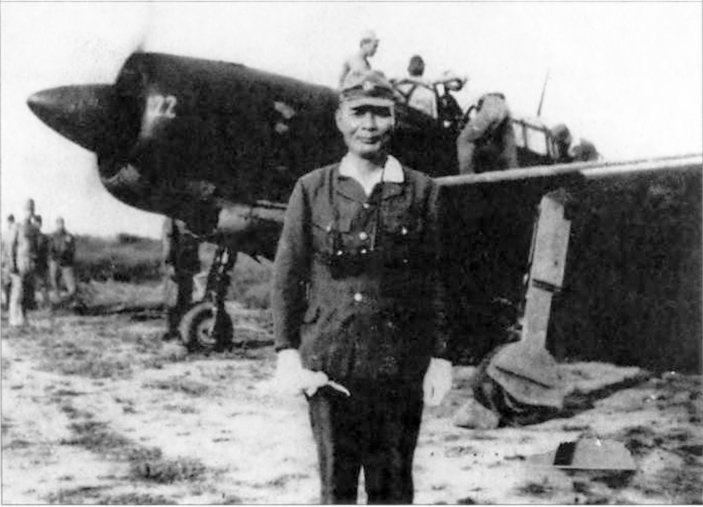 Japanese admiral Ugaki Matome